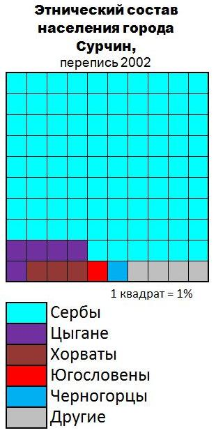 Этнический состав населения города Сурчин (2002)